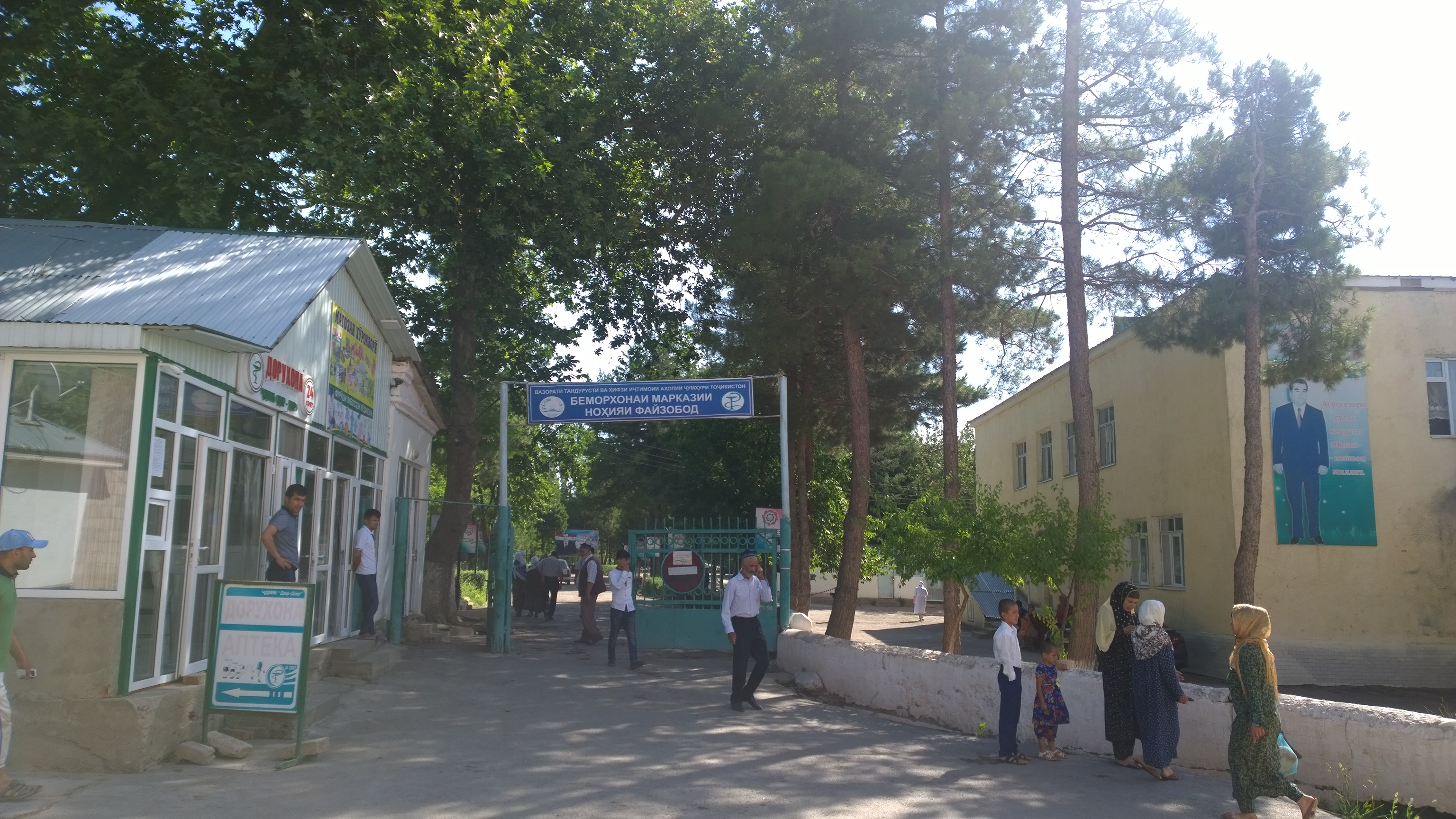 Тоҷикӣ: Беморхонаи марказии ноҳияи Файзобод